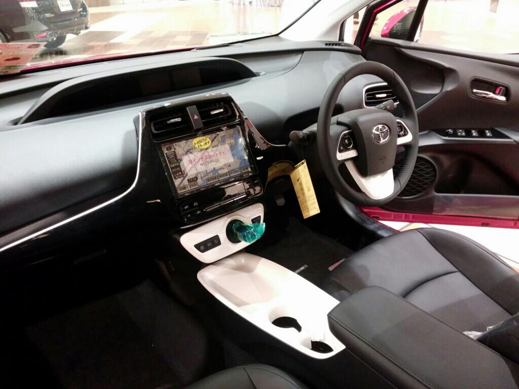 トヨタ・プリウス